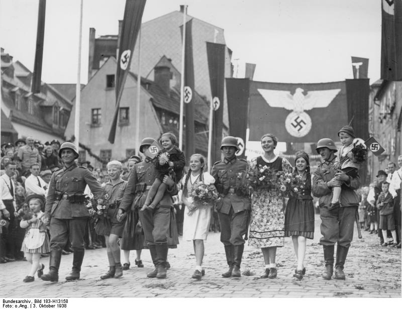 Scherl: Im befreiten Asch. Schnell hat die einheimische Bevölkerung den Kontakt mit den Truppen hergestellt. 3.10.38 ADN-ZB/3.4.90/Am 3. Oktober 1938 - unmittelbar nach dem Münchner Abkommen (29./30.9.38) - überschritten Truppen der deutschen Nazi-Wehrmacht die Grenze zur Tschechoslowakei und annektierten weite Gebiete des Nachbarlandes. Ihr Einmarsch in der Grenzstadt Asch vollzog sich "friedlich", weil 14 Tage vorher bereits von dem zu 98%-igen deutschen Bevölkerungsanteil ein "Freikorps" gegründet wurde und die Macht übernommen hatte. Mit Absperrung gegen eventuell anrückende tschechische Truppen an der schmalsten Stelle mit nur wenigen Kilometern zwischen Bayern und Sachsen im Ascher Bezirk. Information added by Wikimedia users.Česky: Průvod jednotek wehrmachtu, který vstoupil do Aše 3. října 1938